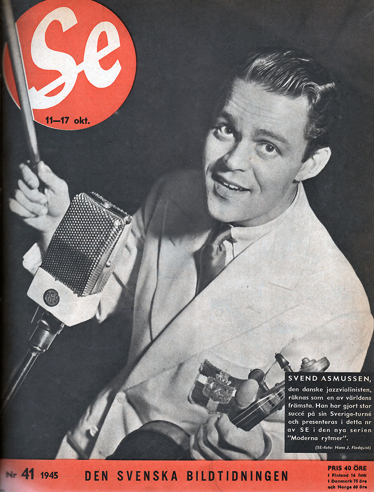 Svend Asmussen